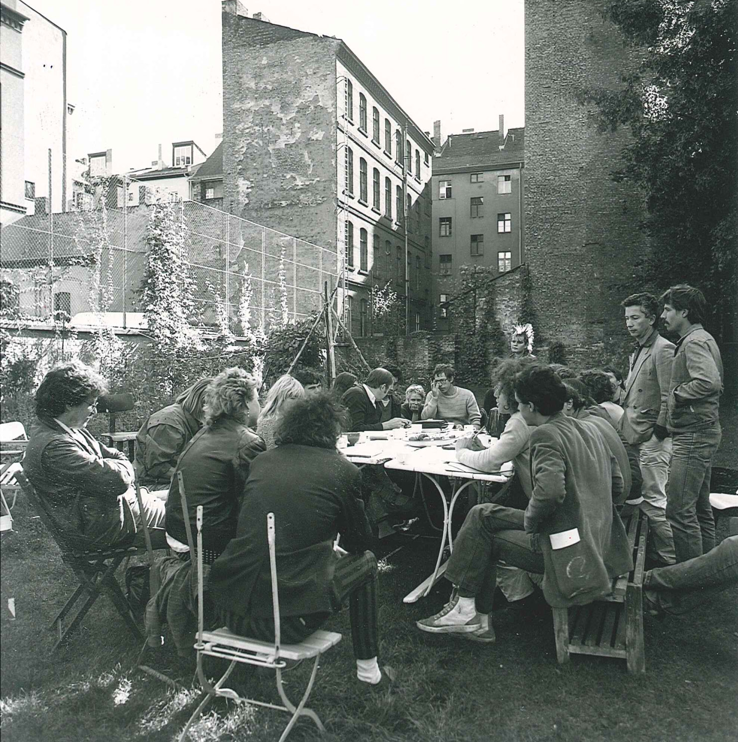 Aufsichtsrat der Firma STATTBAU (Sanierungsträger Berlin), 1983.